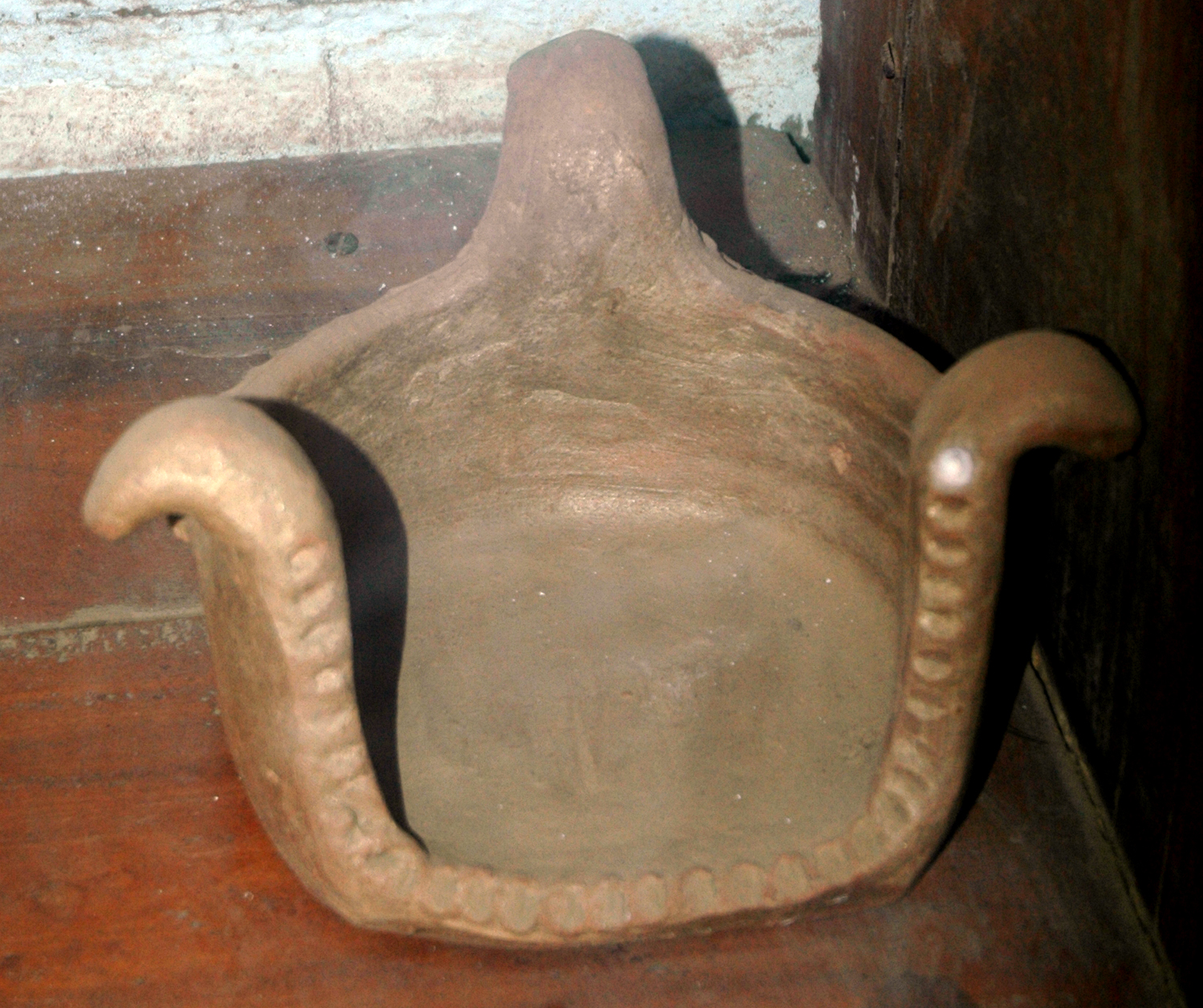 மண் அடுப்பு - தொல் பொருட்காட்சிச்சாலை, யாழ்ப்பாணம்